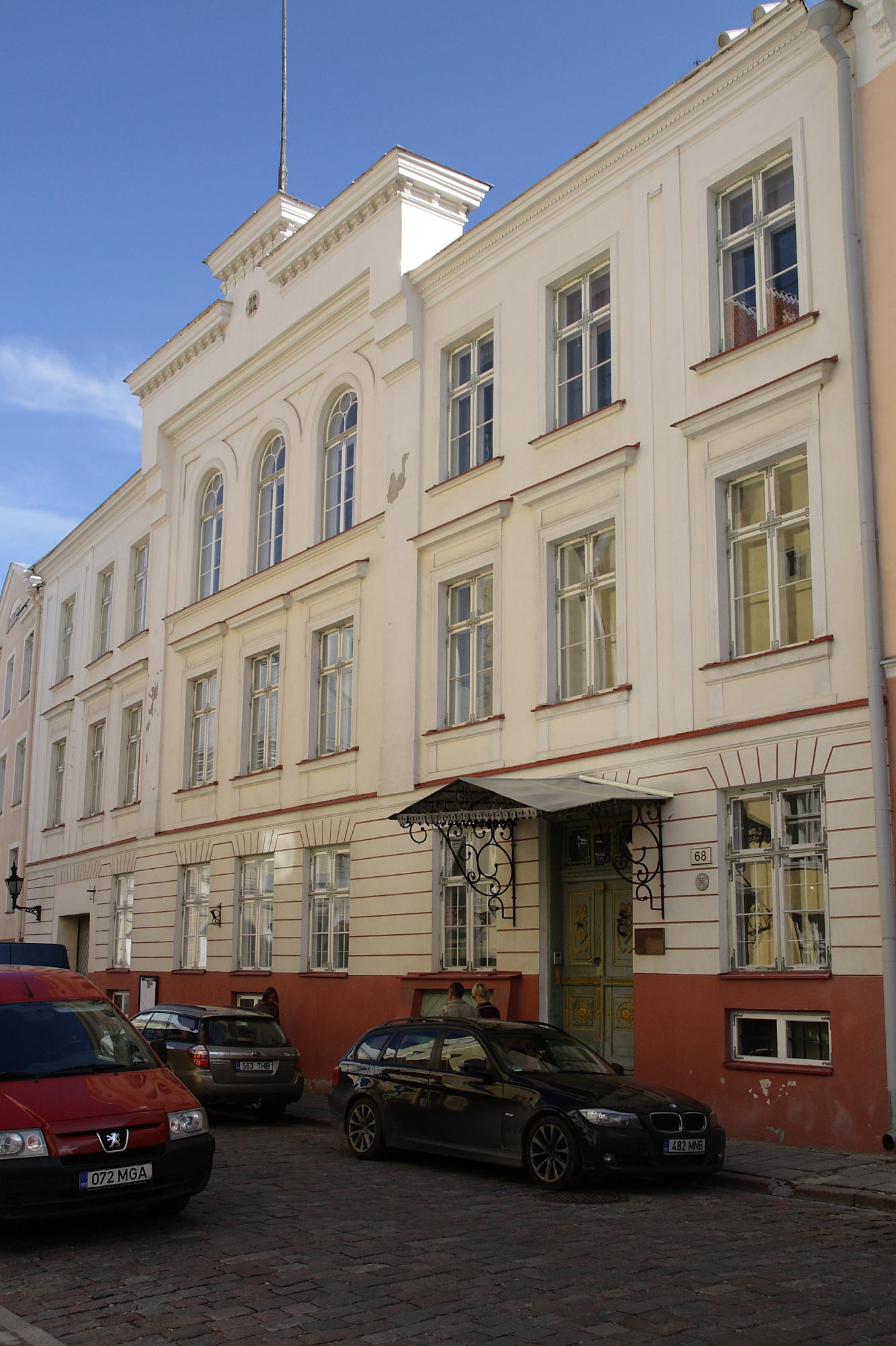 Tallinn, elamu Pikk 68